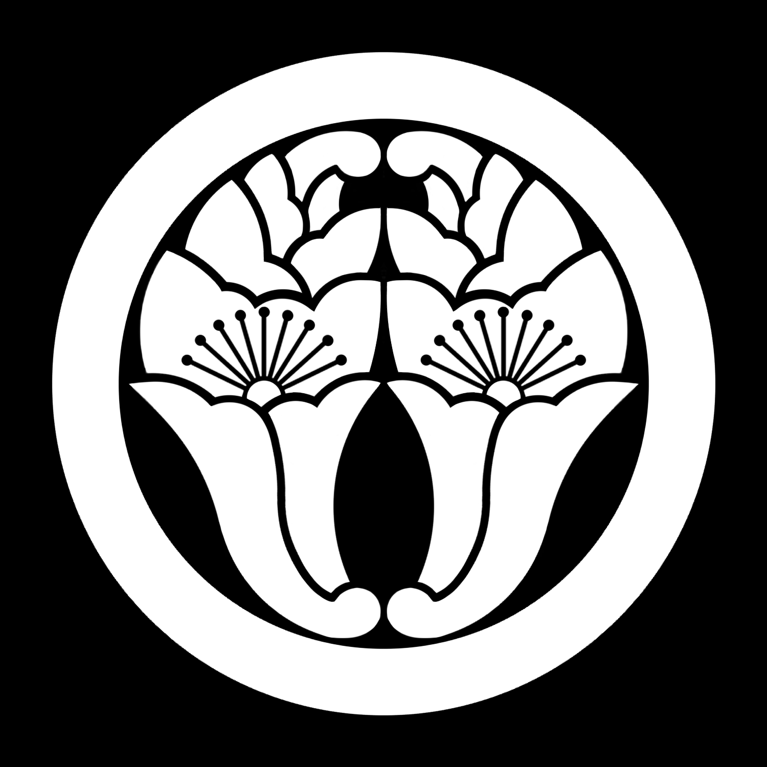 「丸に抱き花杏葉」紋（染抜）